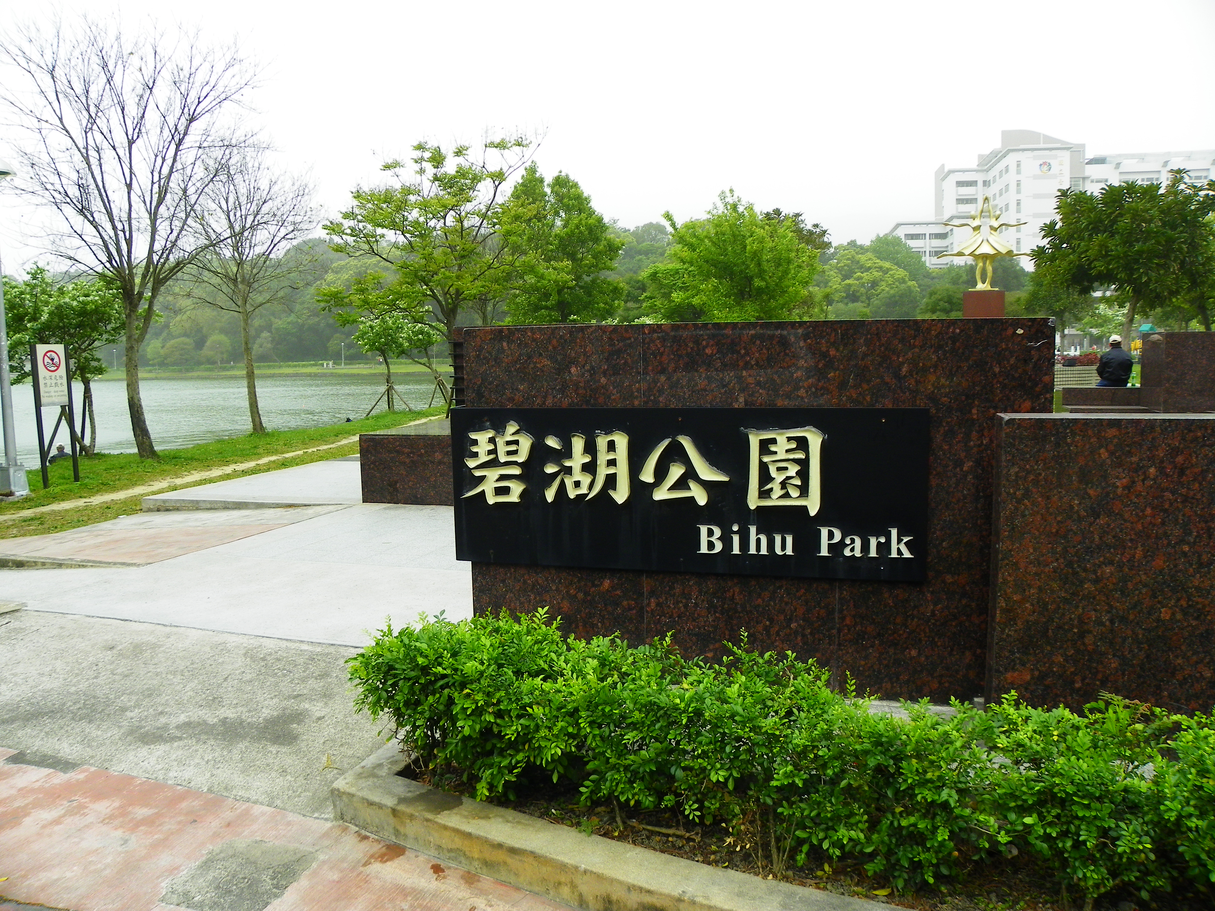 碧湖公園東南入口的題額。